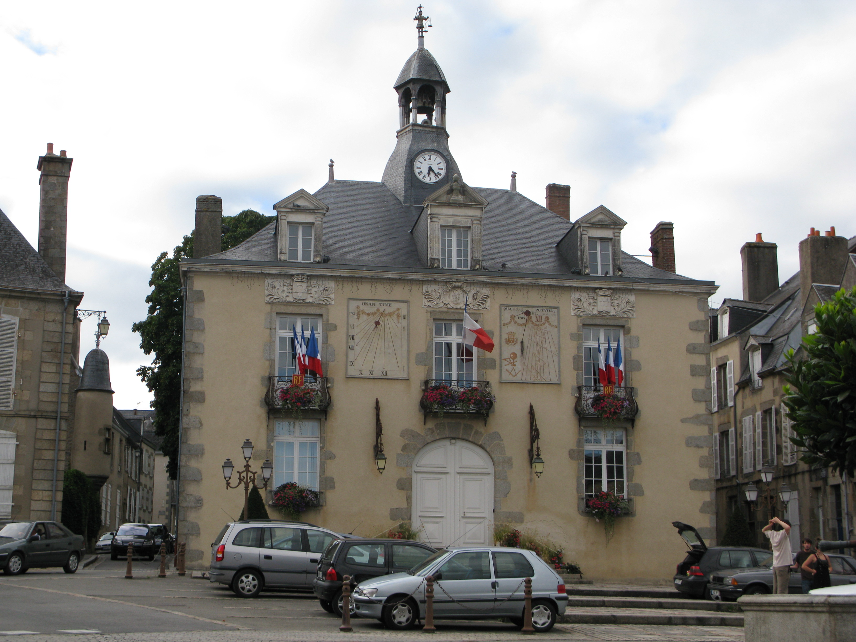 L'ancienne mairie de la ville de Mayenne, qui abrite aujourd'hui le Pays de Haute Mayenne.